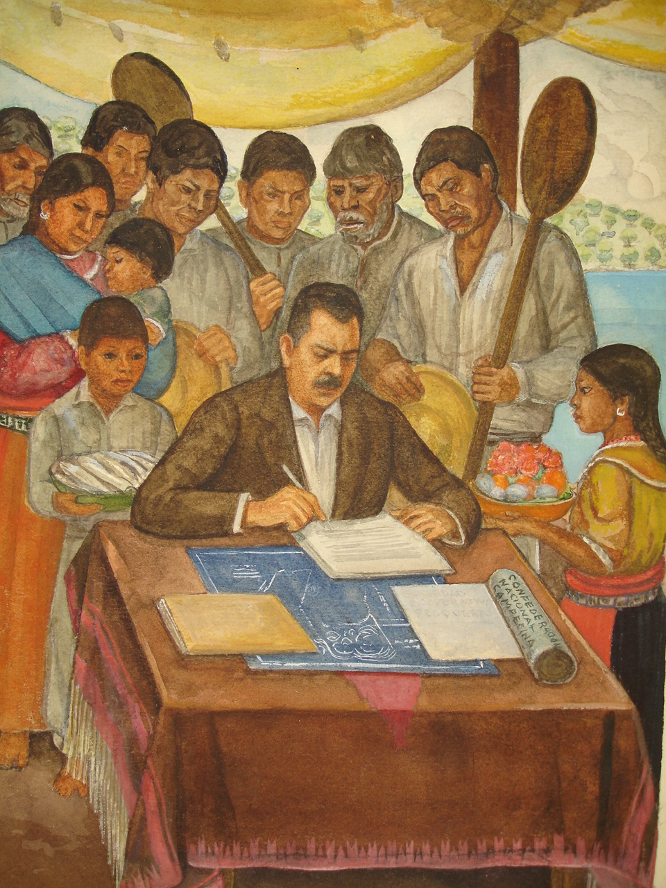 Lázaro Cárdenas en Jiquilpan, Michoacán.